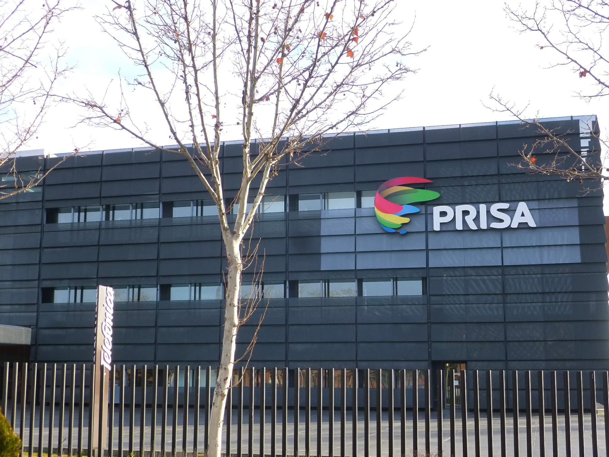 Centro Corporativo del Grupo PRISA (Tres Cantos)